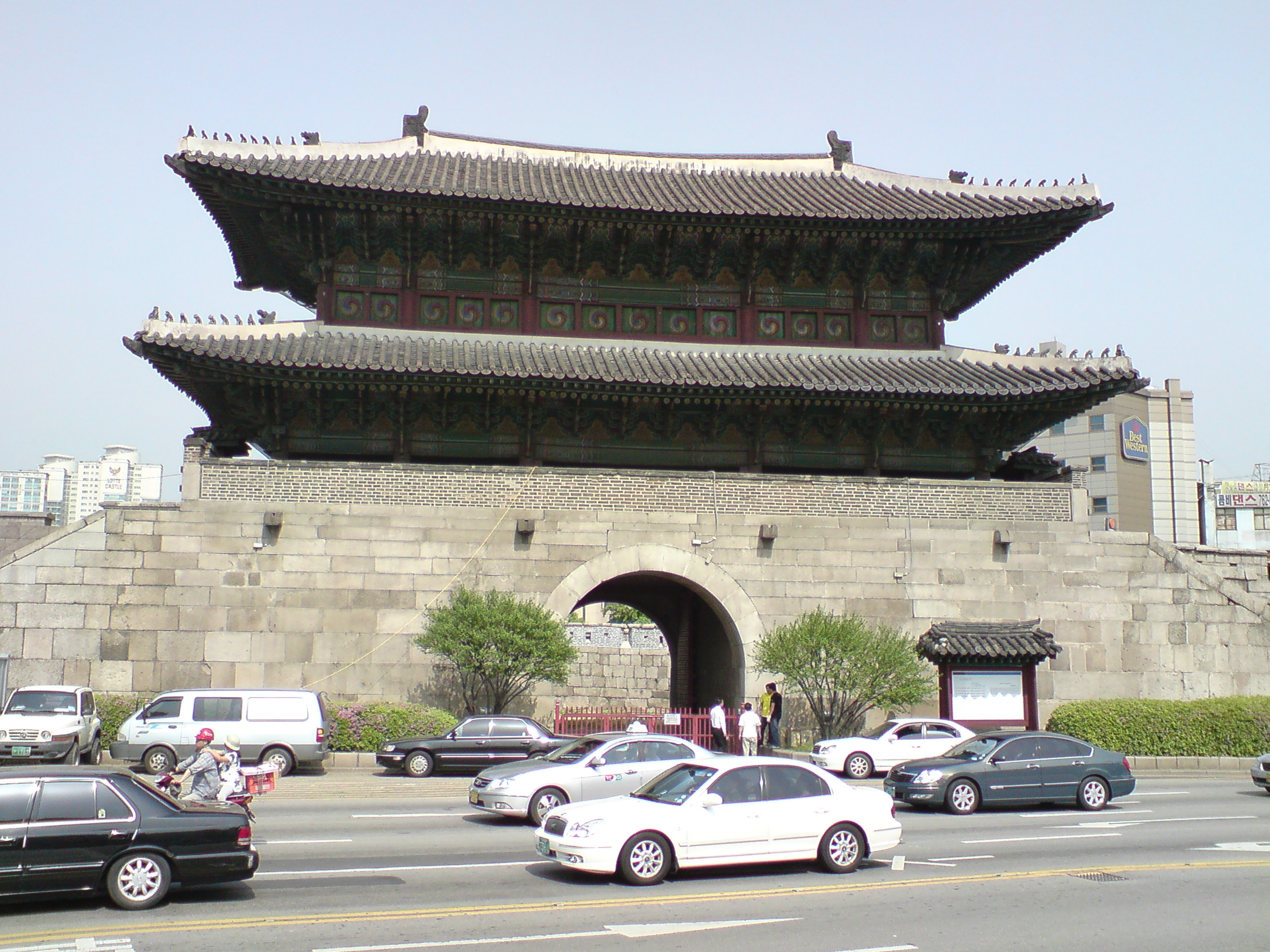 Korea-Seoul-Dongdaemun gate